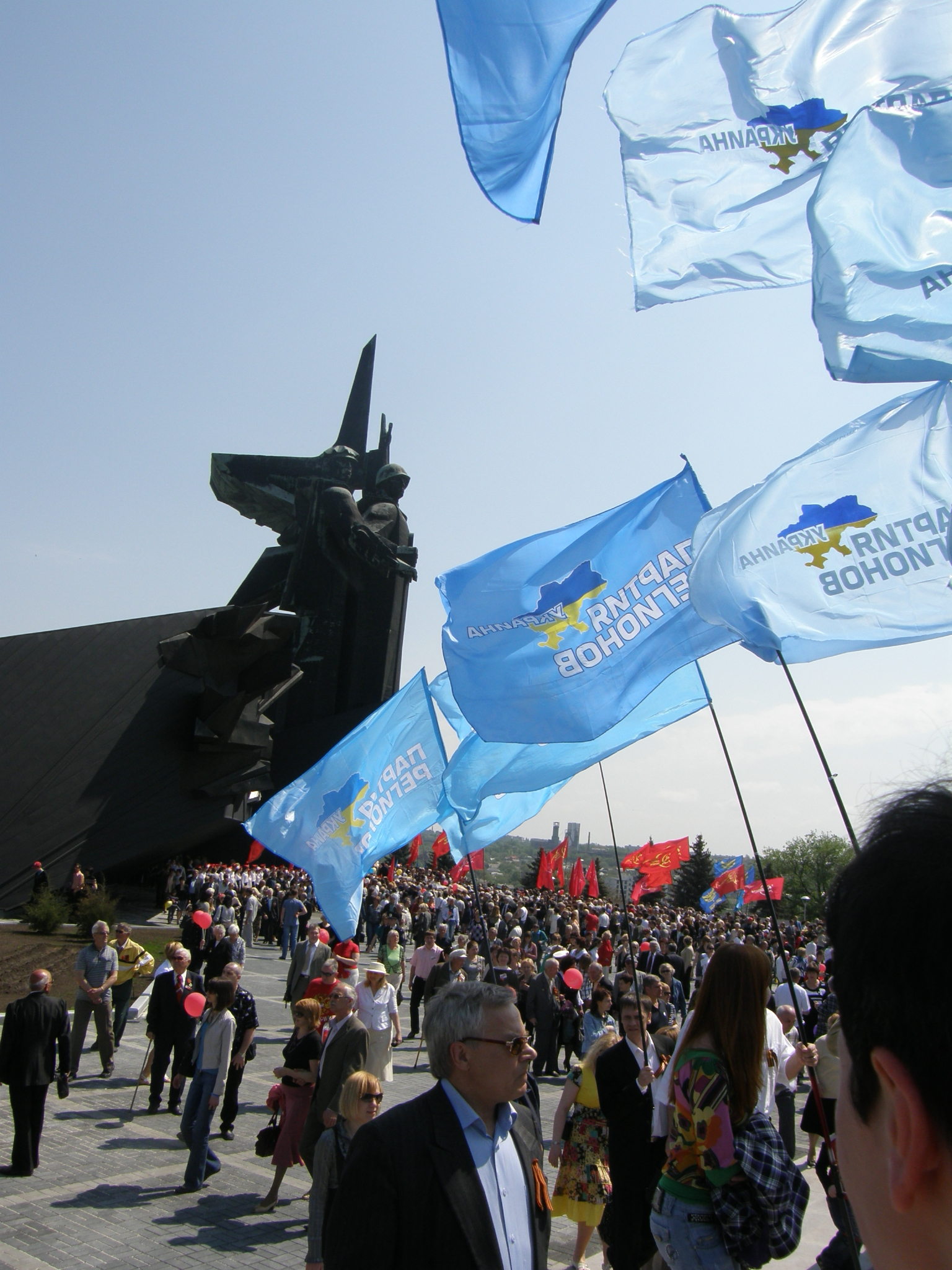 Донецк. Парк Ленинского комсомола. Празднование Дня Победы.